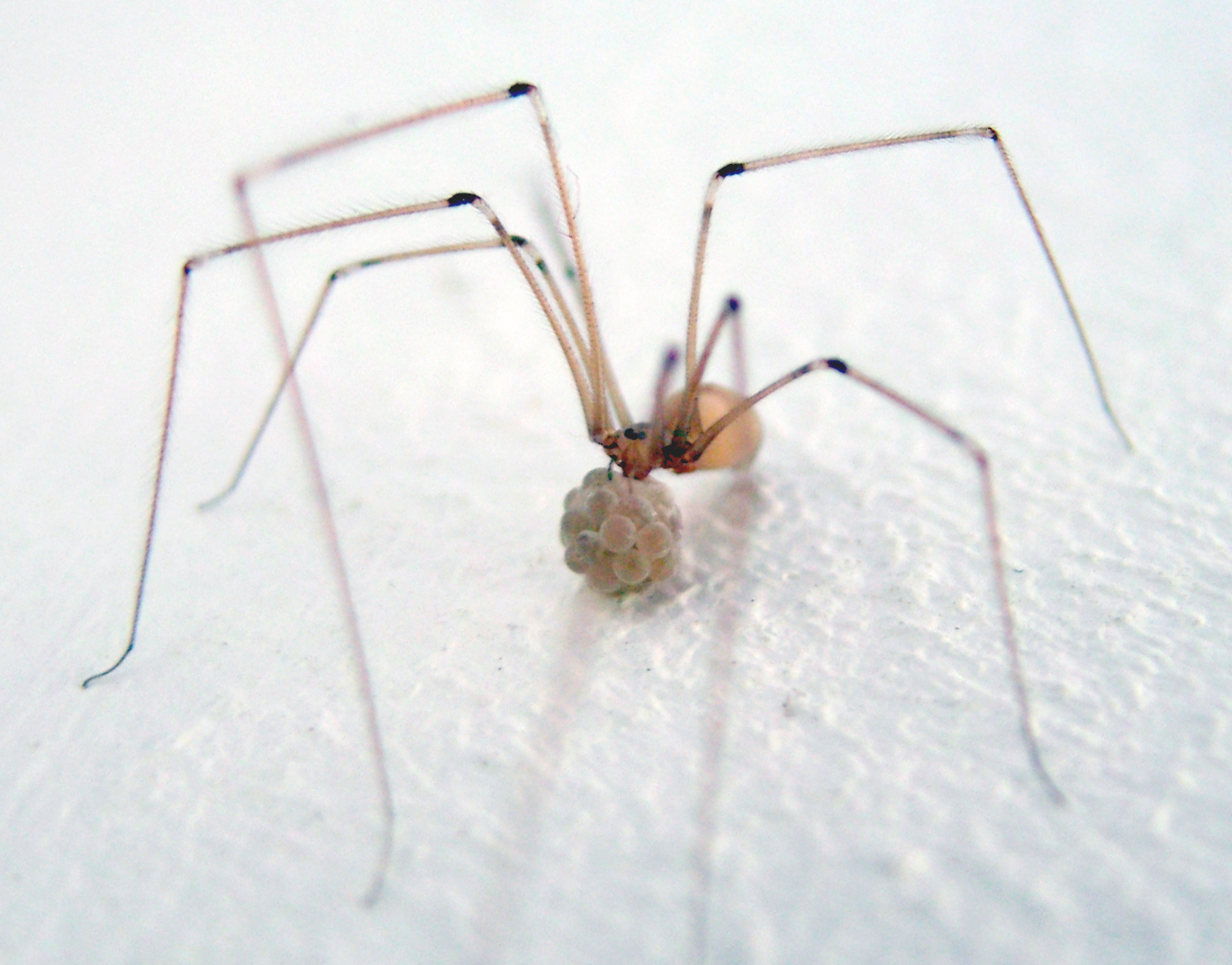 Spinne mit Brut